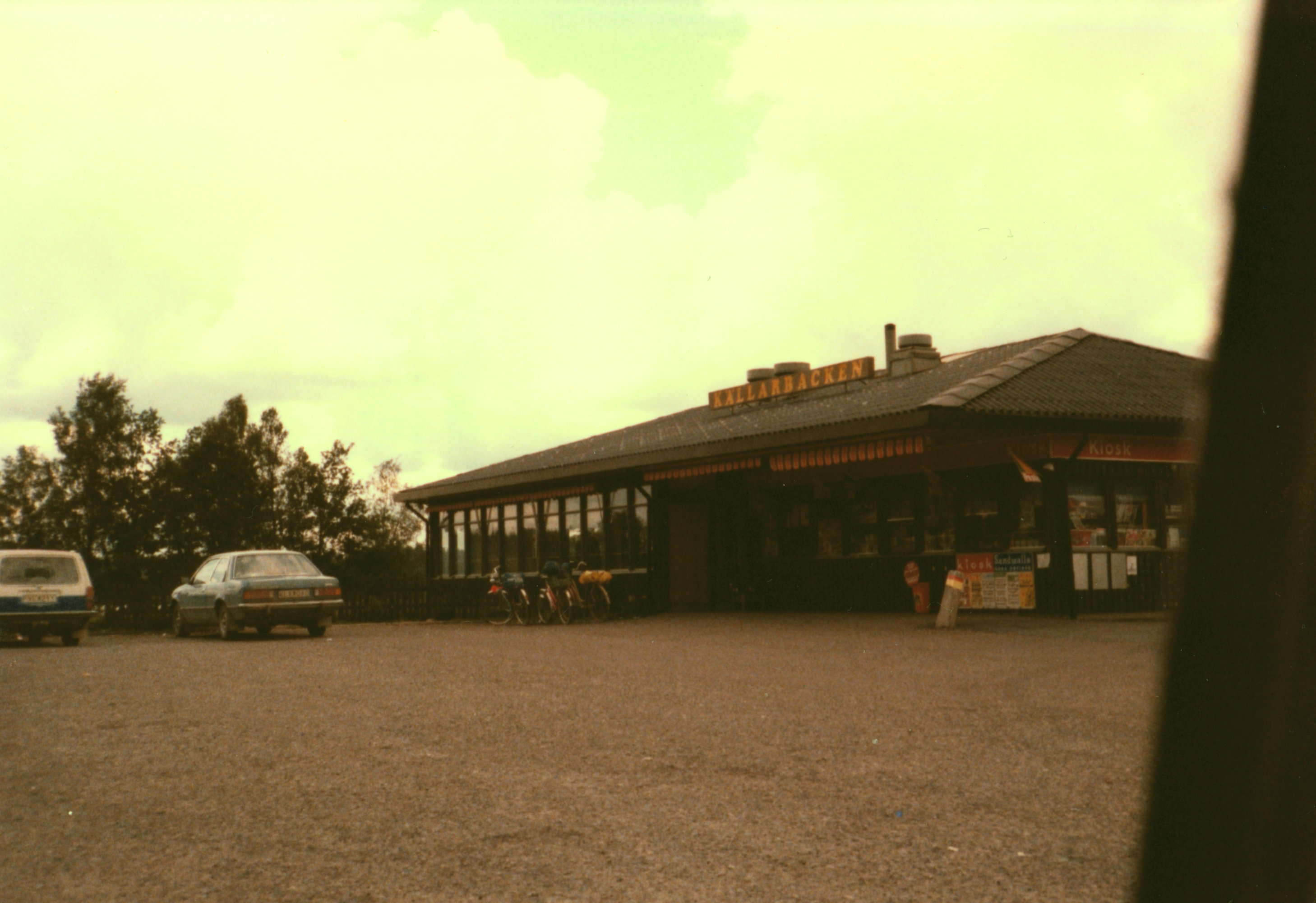 Källarbacken, Hällingsjö, 1979